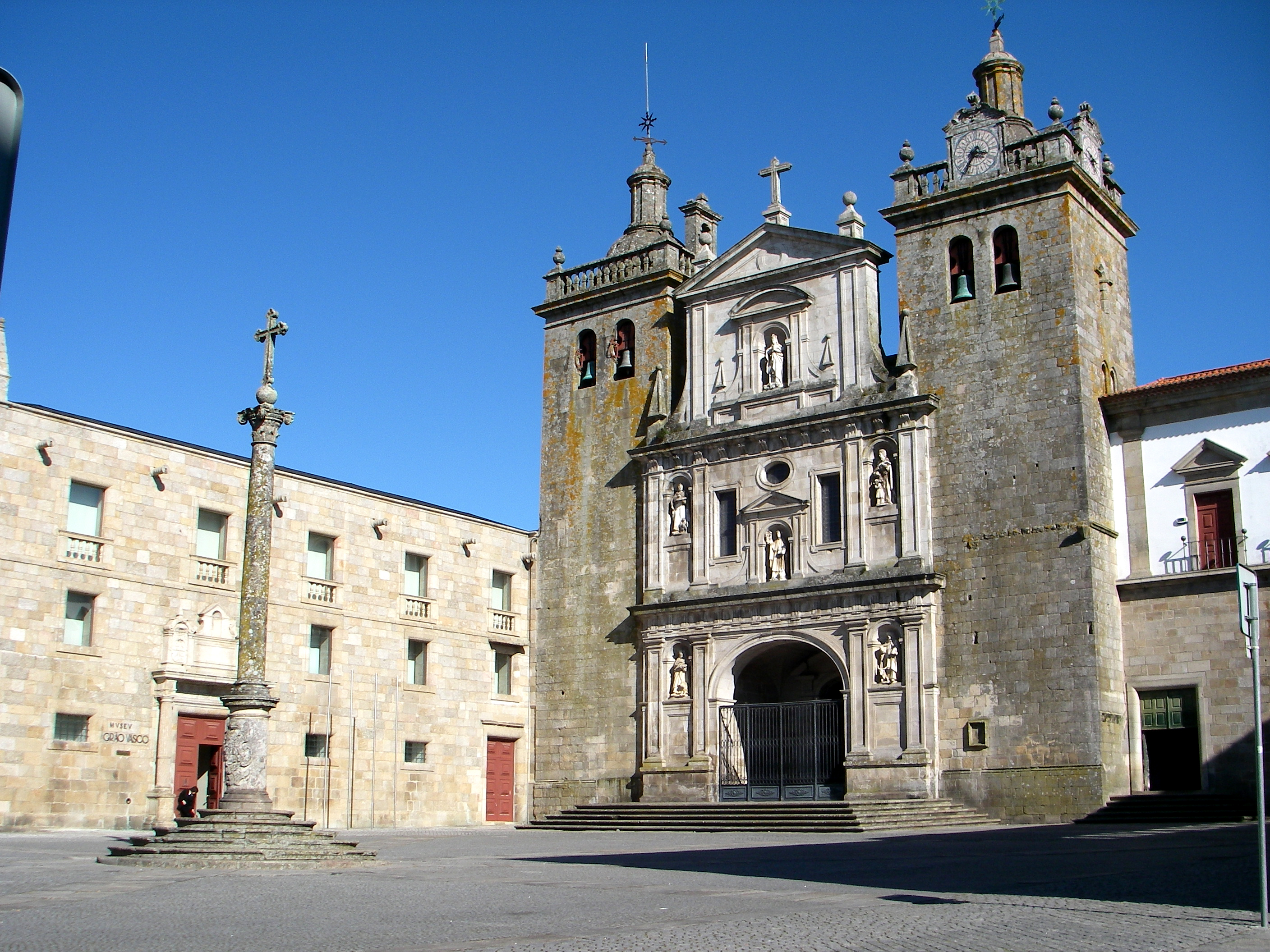 Sé de Viseu This file was uploaded for Wiki Loves Monuments in Portugal with the unique identifier 70673.